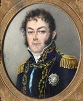 Juan Martín de Pueyrredon, prócer argentino